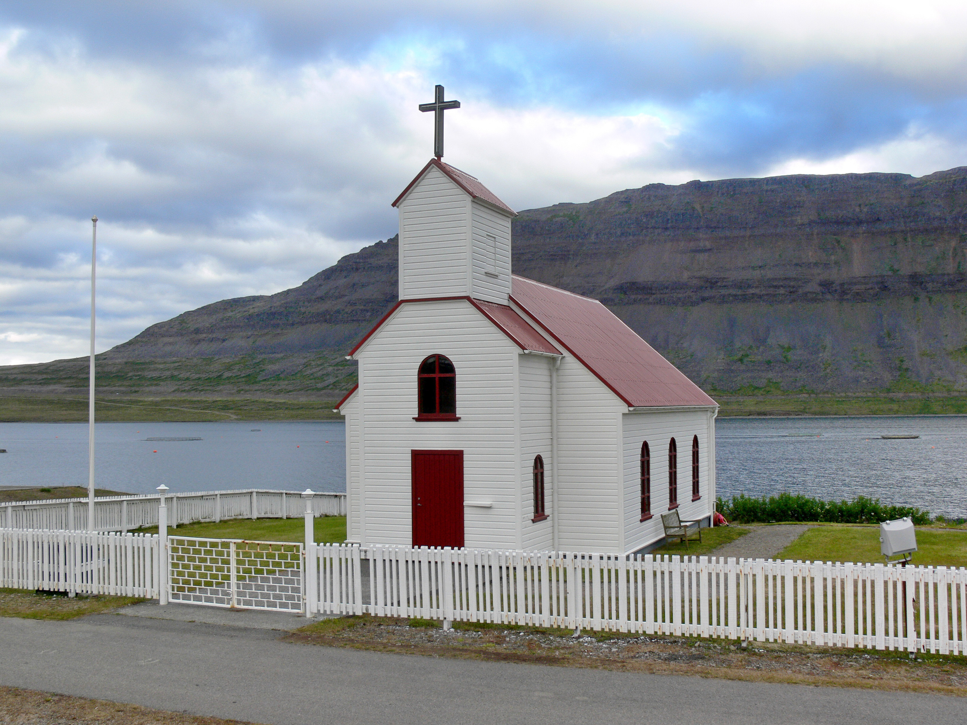 Kirche von Súðavík im Fjord Álftafjörður im Ísarfjarðdardjúp